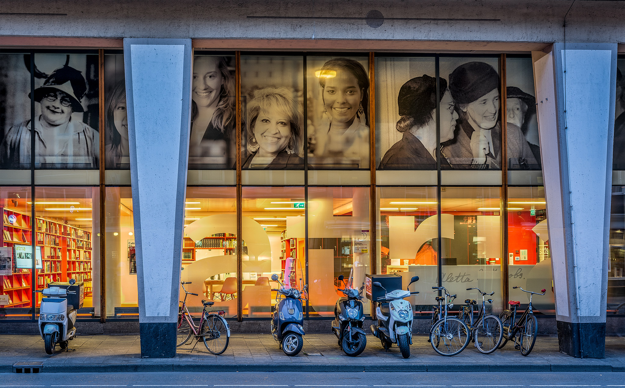 Atria, Institute on gender equality and women's history, Vijzelstraat 20, Amsterdam, The Netherlands